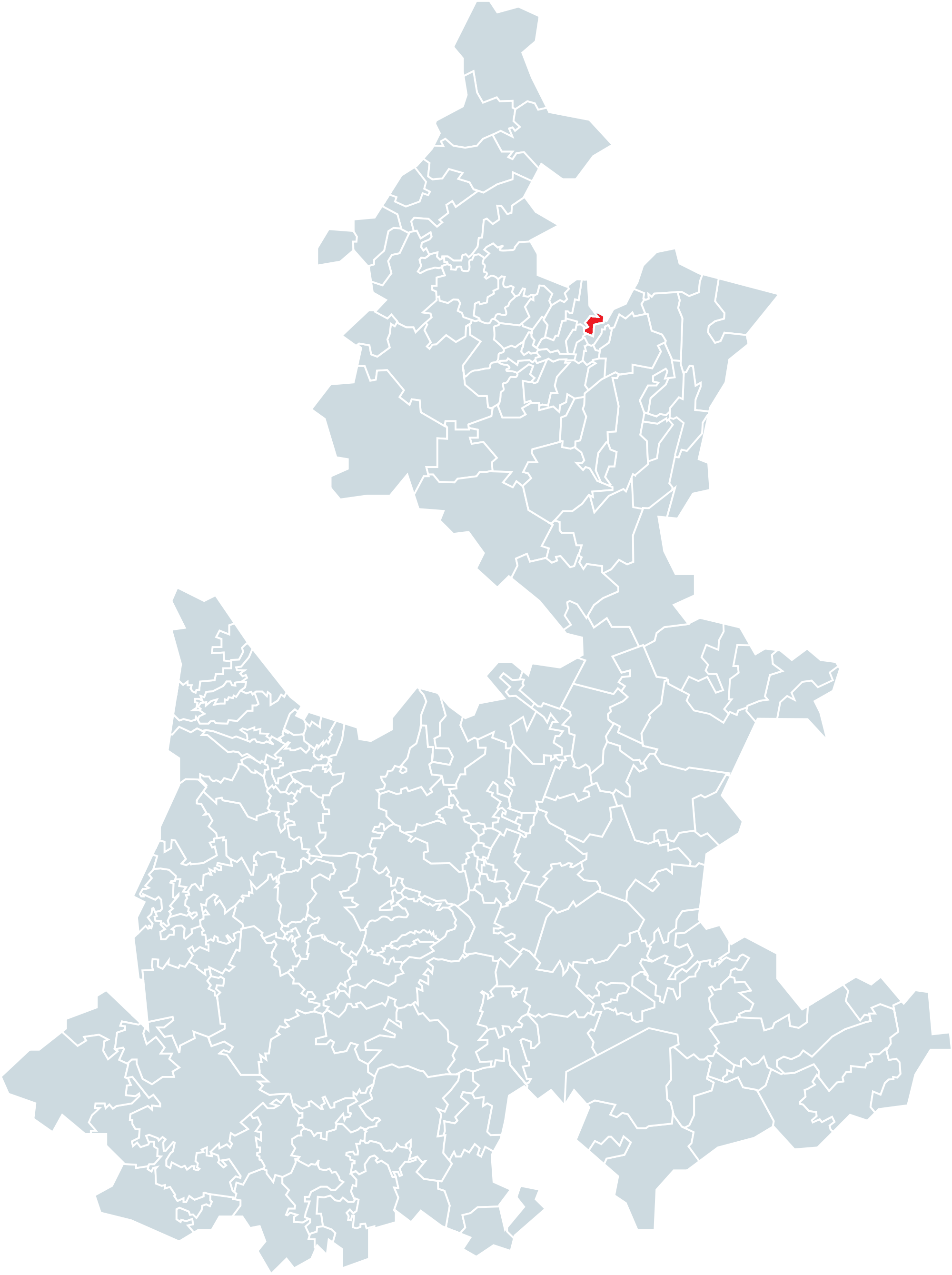 Municipio de Caxhuacan